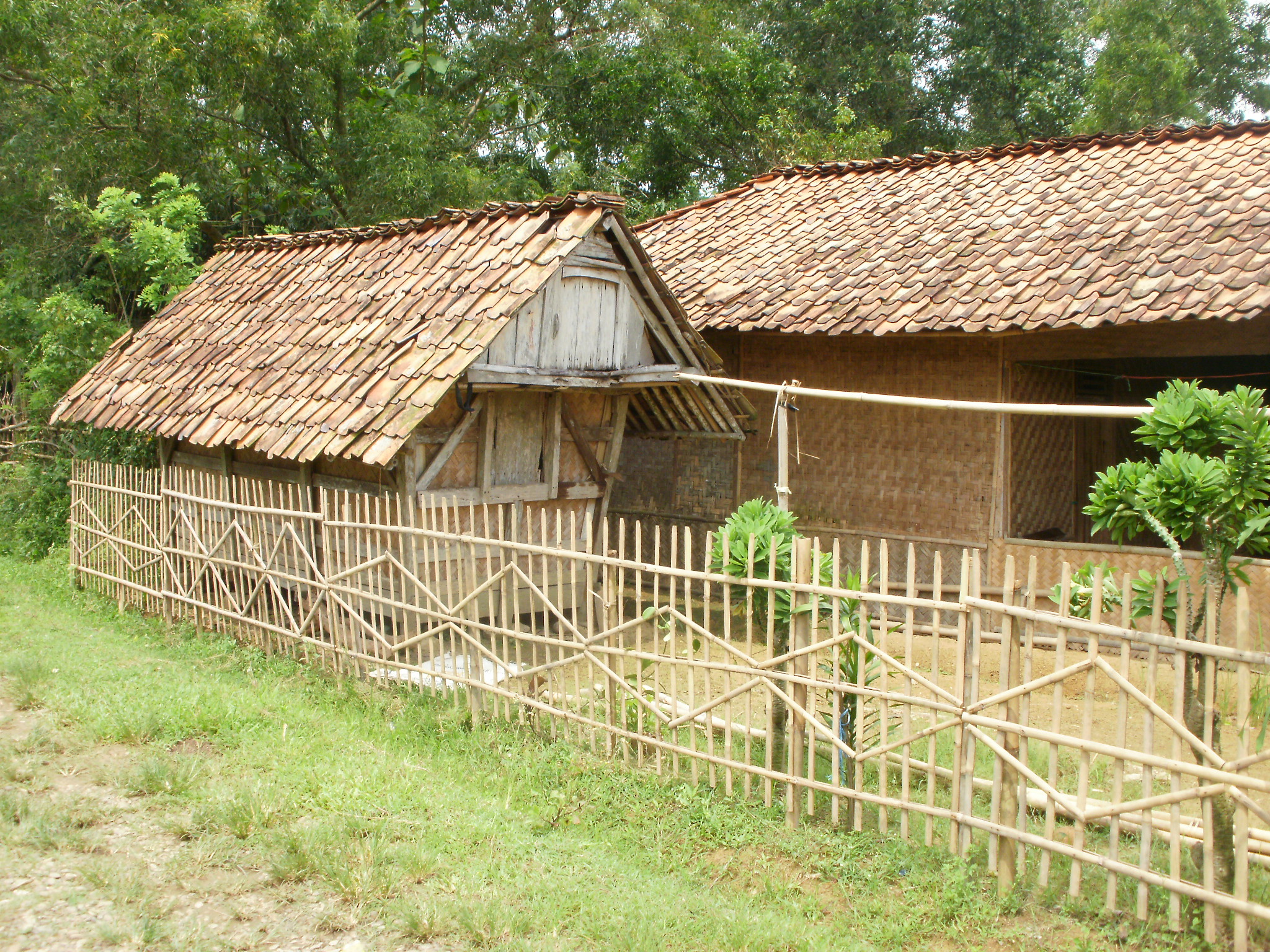 Maison en bambou dans la région de Bekasi, Java Ouest, Indonésie (photo prise en 2011)